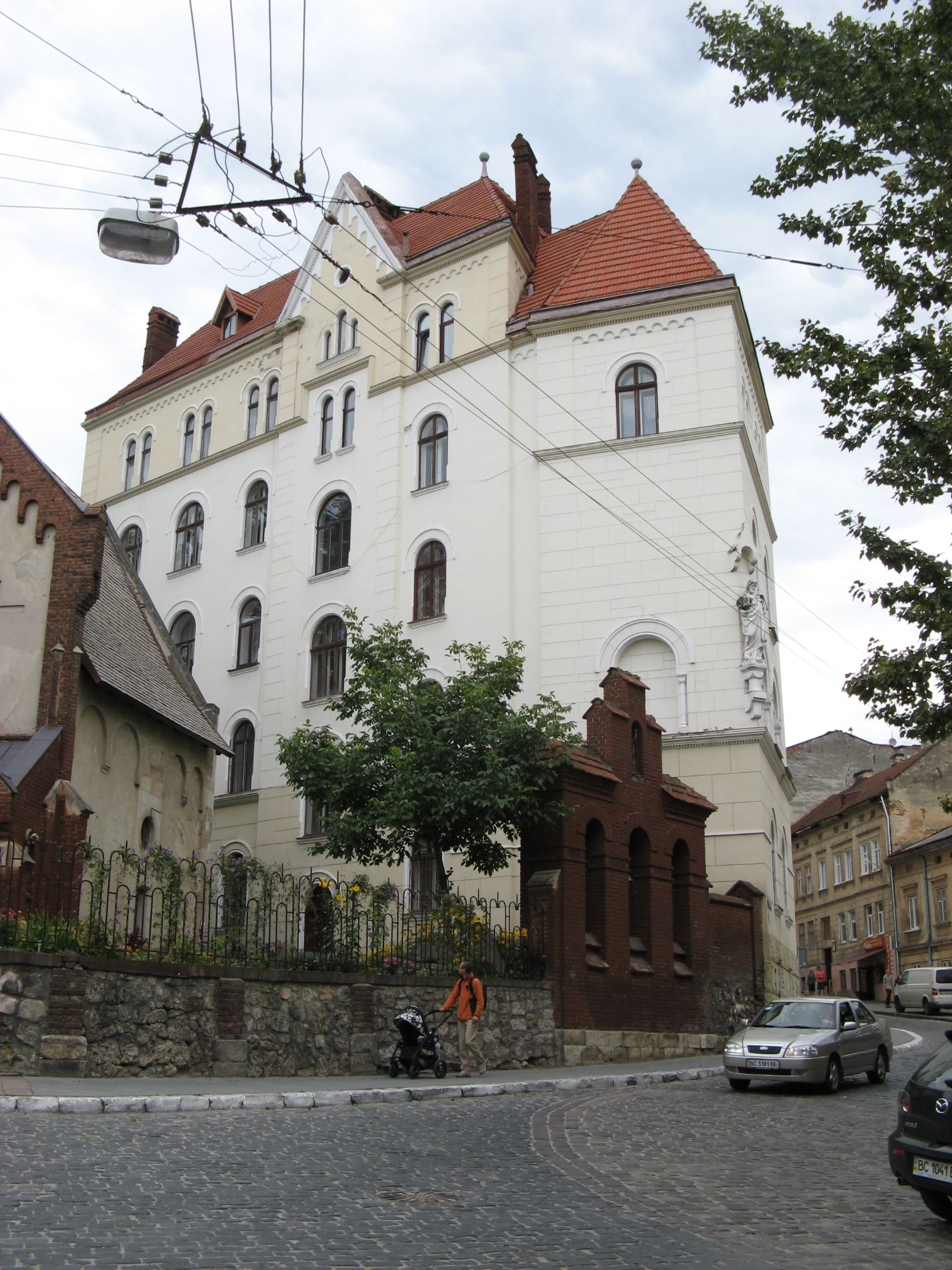 1, вул. Ужгородська (Львів). Архітектор Едмунд Жихович (1870-1924).